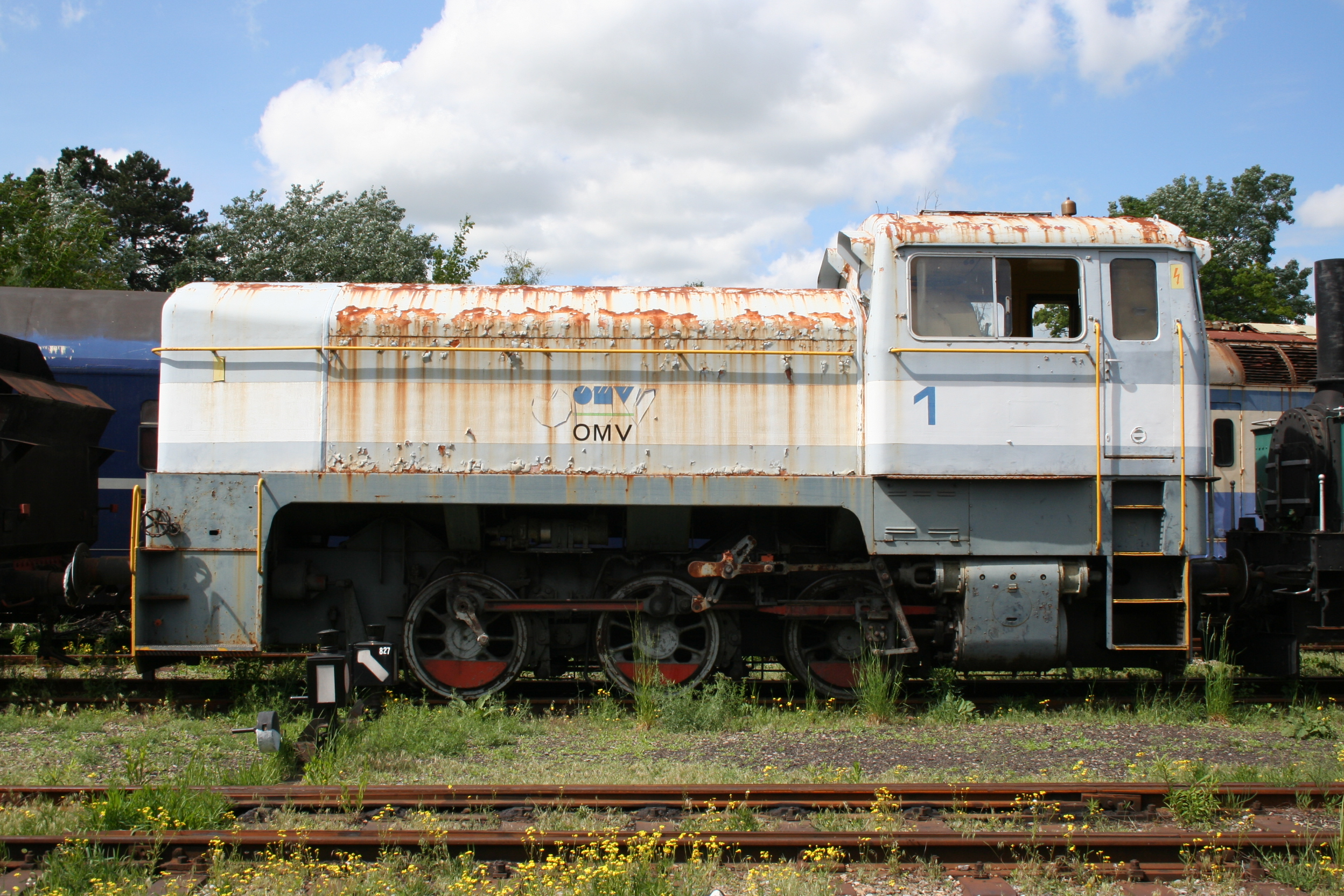 Dampfspeicherlok 1 der OMV Strasshof 20.05.06